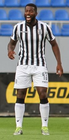 Фернадо Варела - футболіст ПАОКа